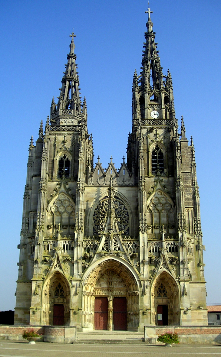 La façade de la basilique Notre-Dame de l'Épine. Auteur Photographie personnelle prise et mise en ligne par Frikar.